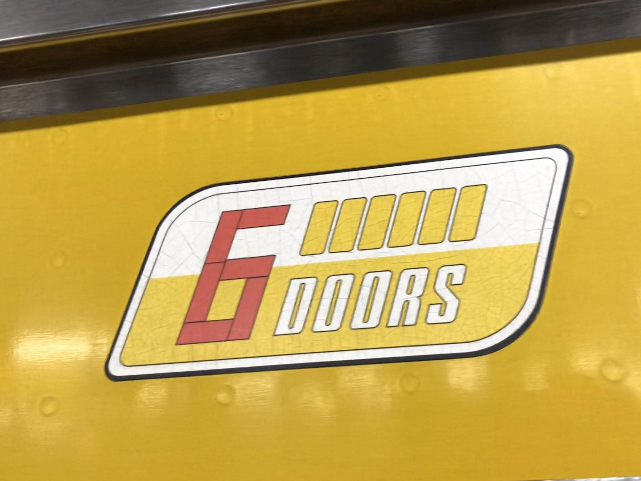 E231系0番台に取り付けられている6ドアステッカー